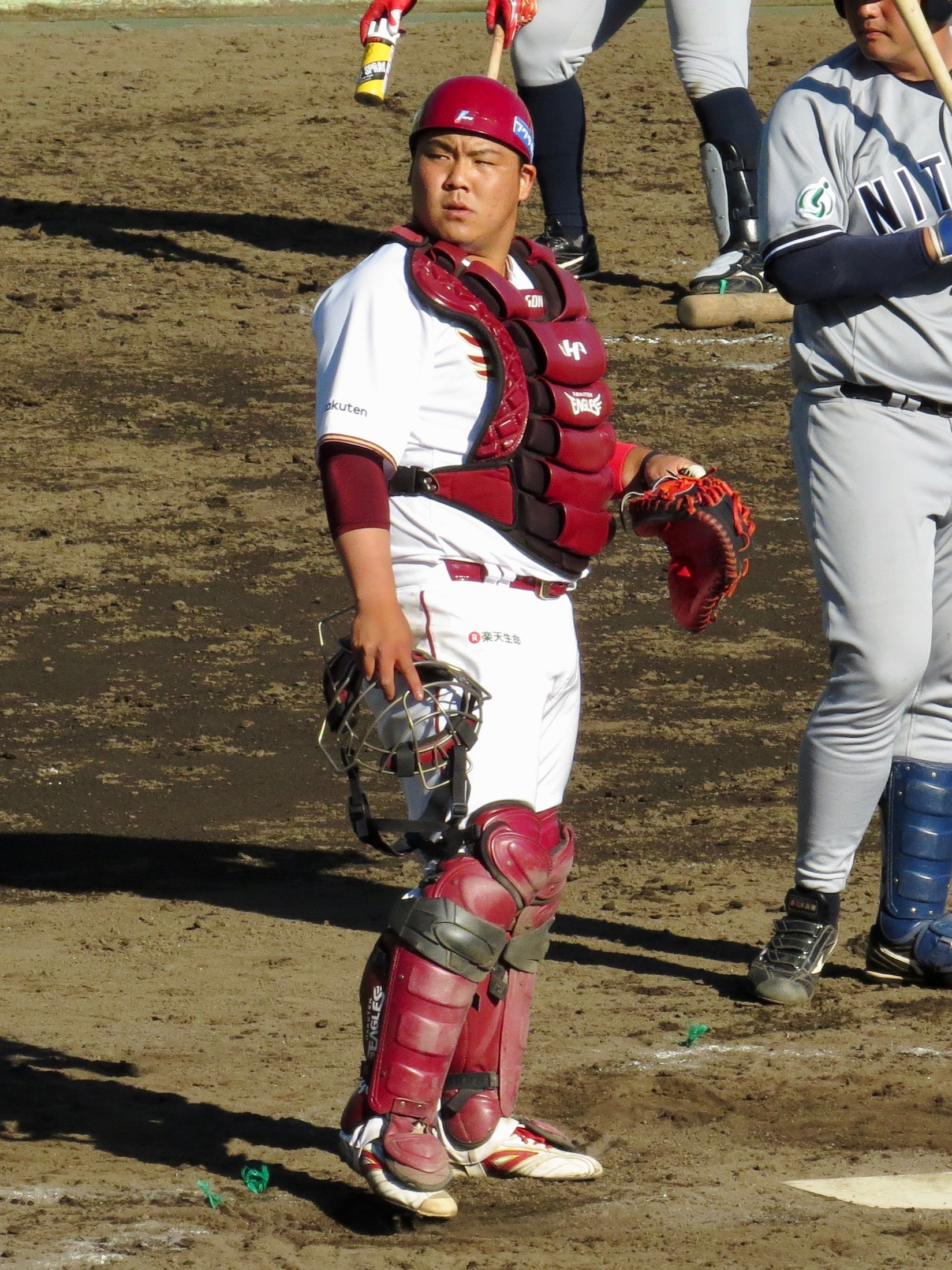 さいたま市営浦和球場にて